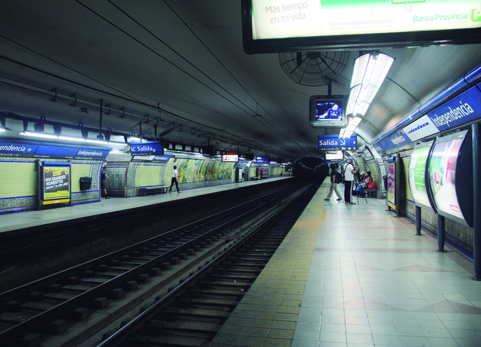 Andén de la estación independencia de la línea C del Subterráneos de Buenos Aires